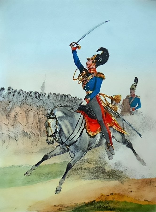 Mecklenburger Chevaulegersregiment 1835, hierː Stabsoffizier.